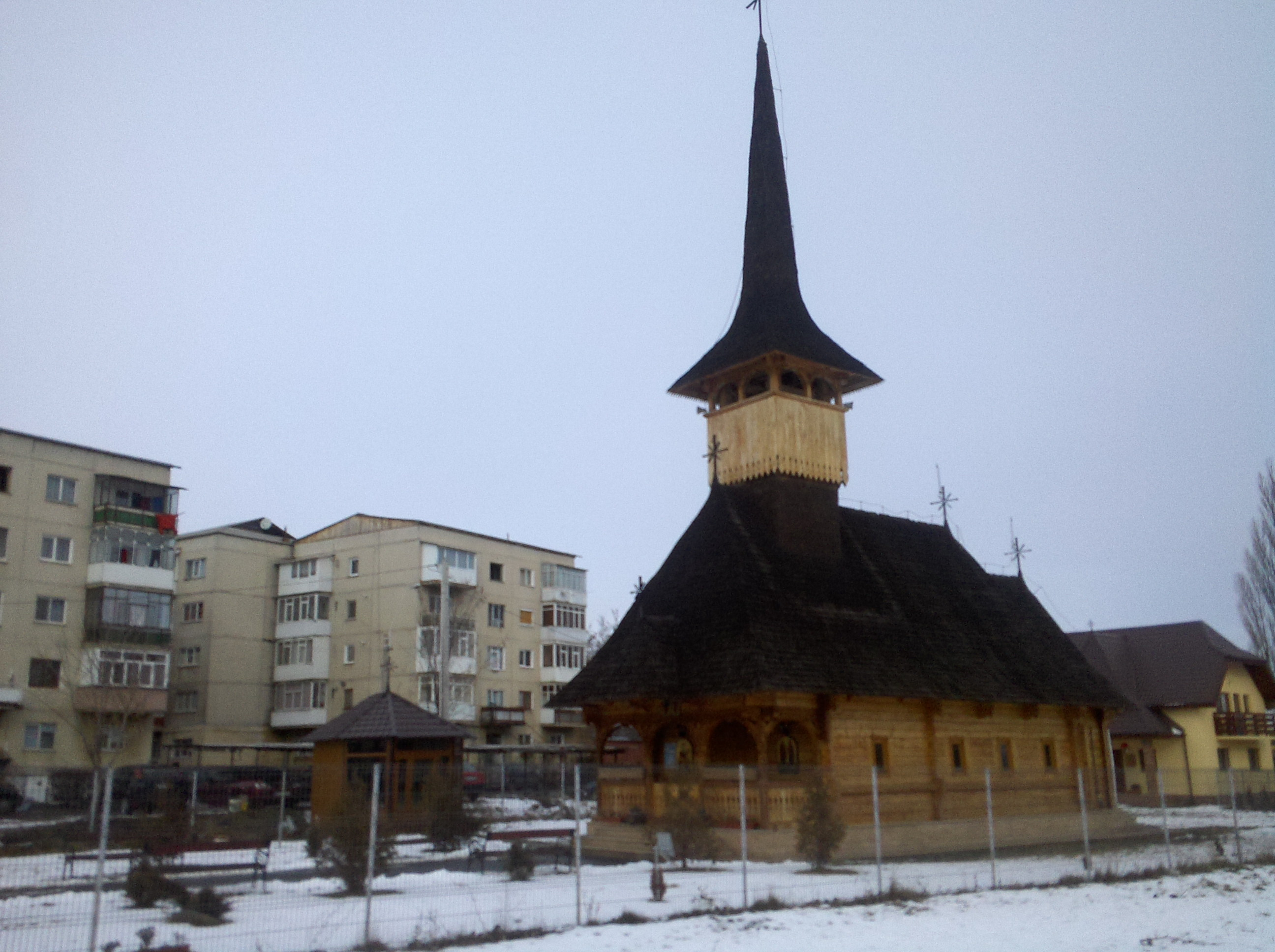 Kinderkirche